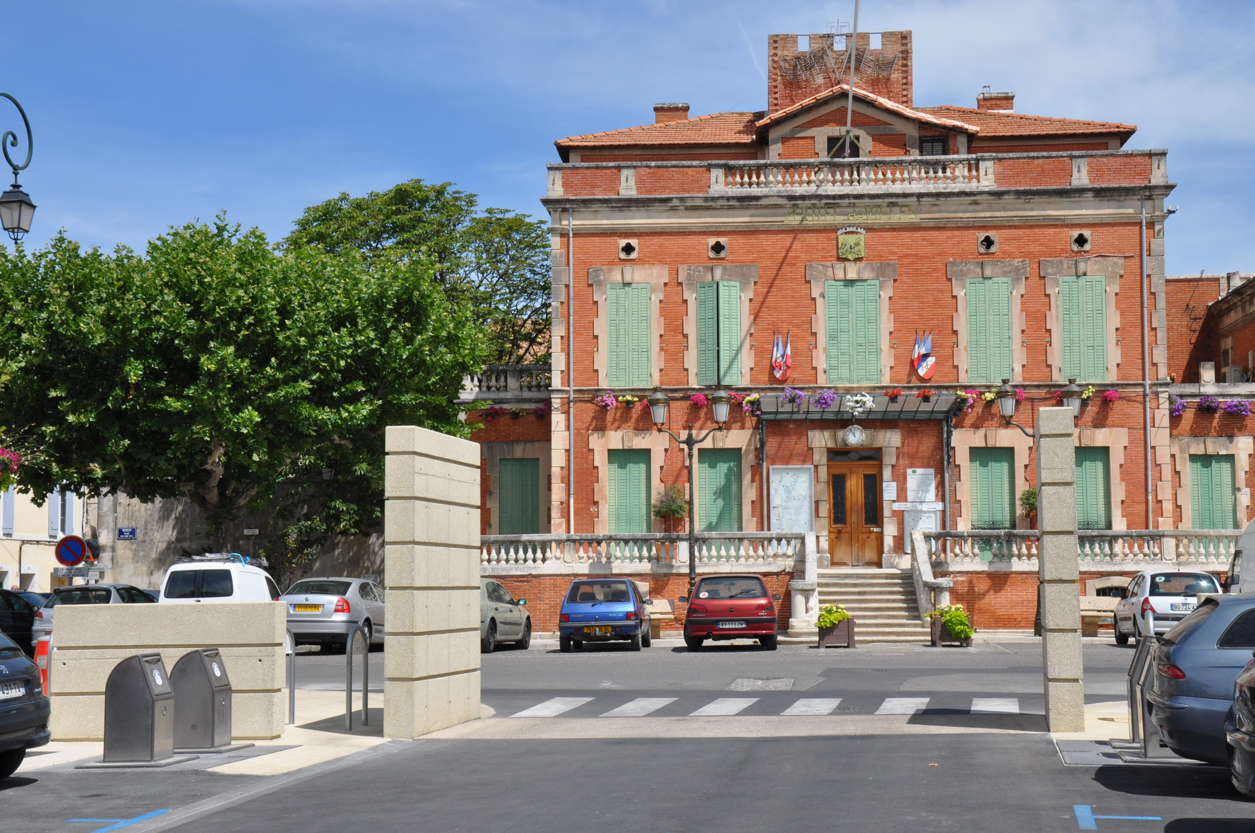 Mairie d'Entraigues sur la Sorgue depuis le nouveau parking